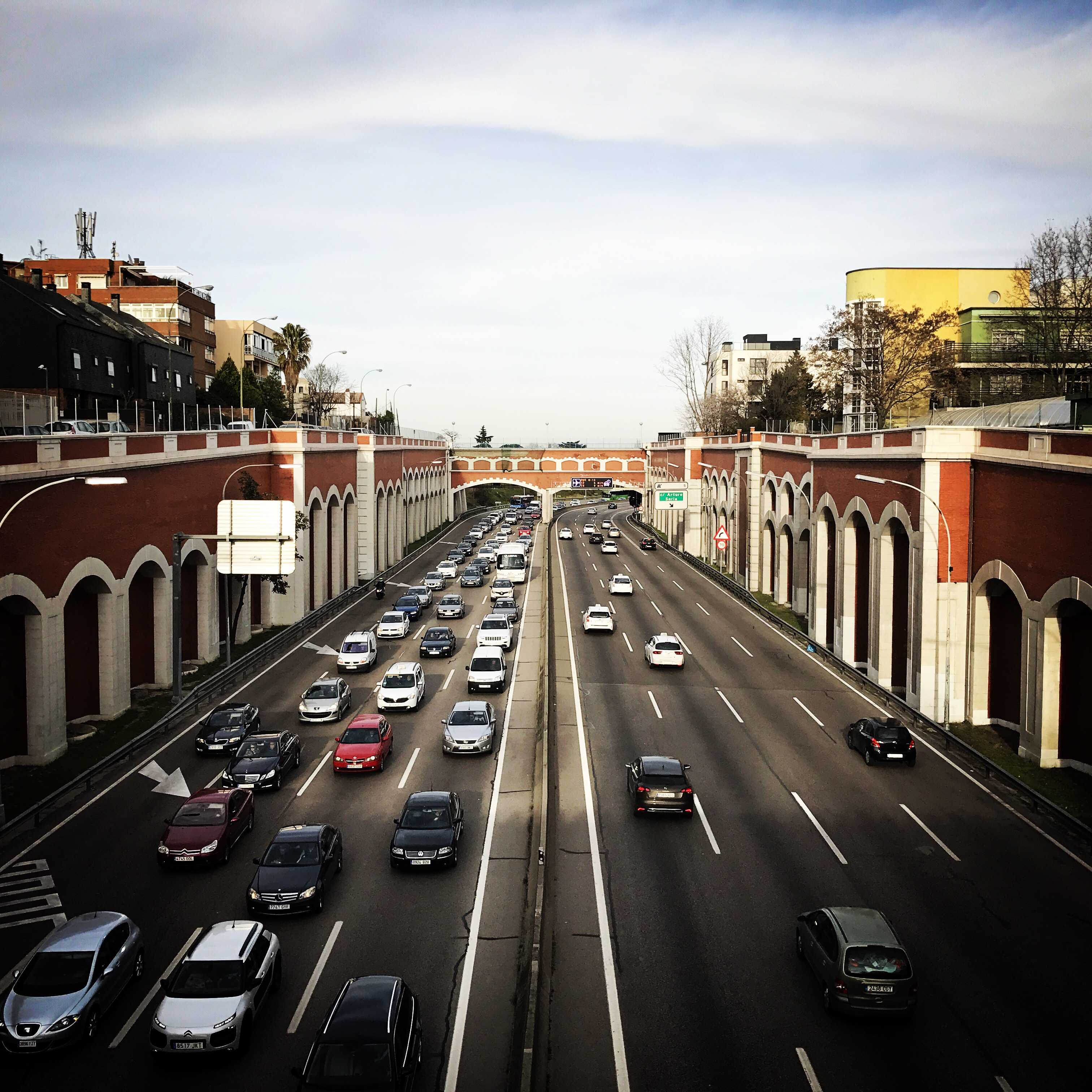 Aspecto característico del Puente de la CEA sobre la calle Arturo Soria y la A-2 en Madrid, España